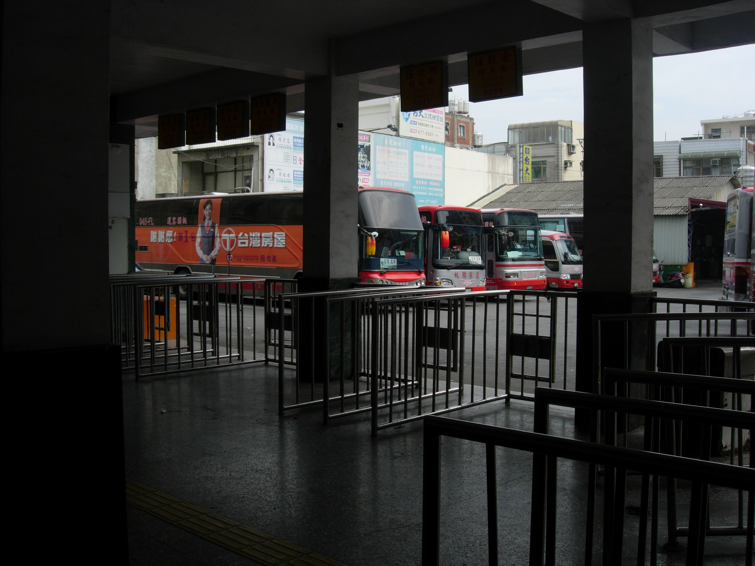 中文（台灣）: 桃園客運新屋站路線。